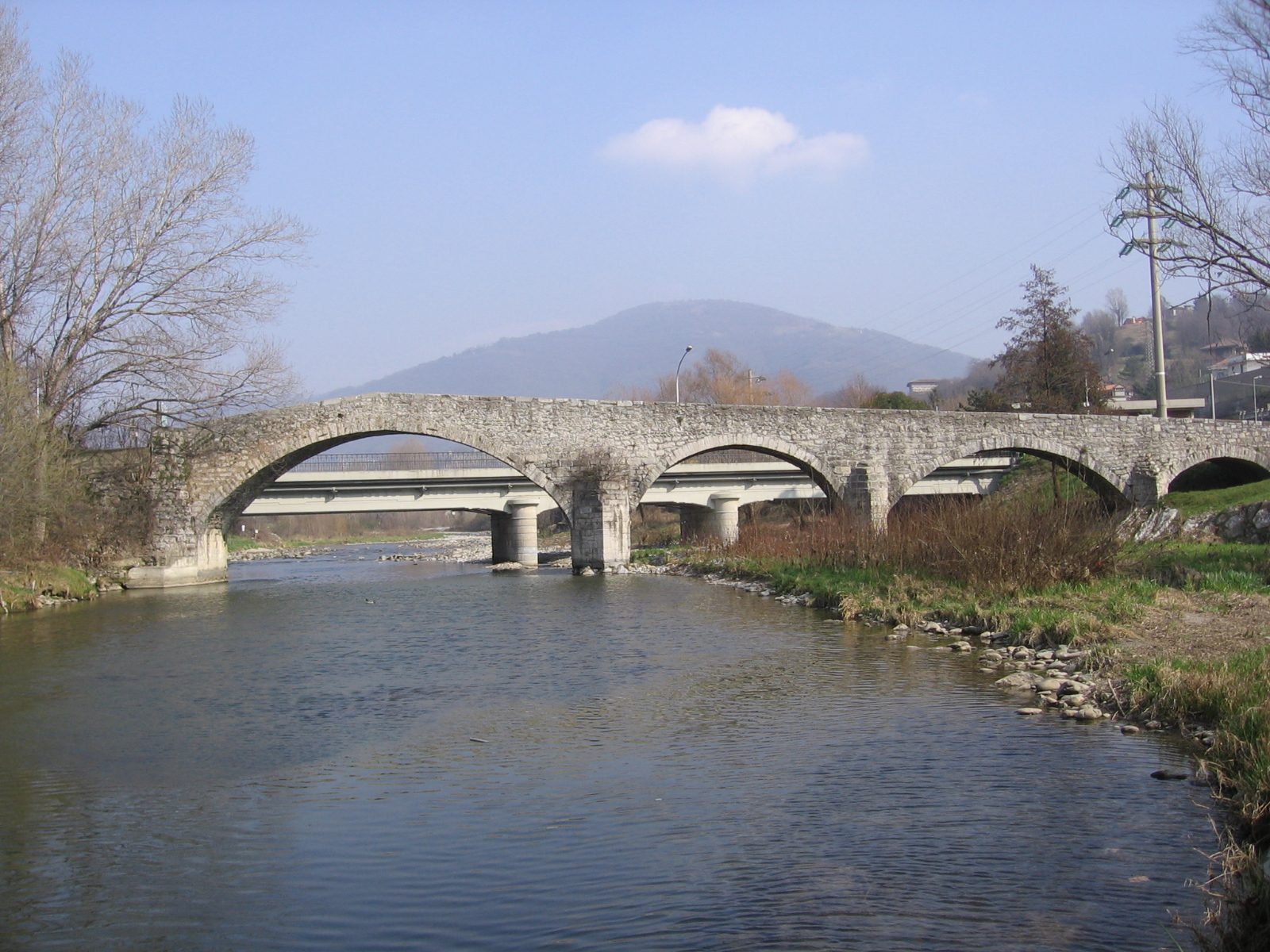 Fiume Serio ad Albino, Bergamo, Italy